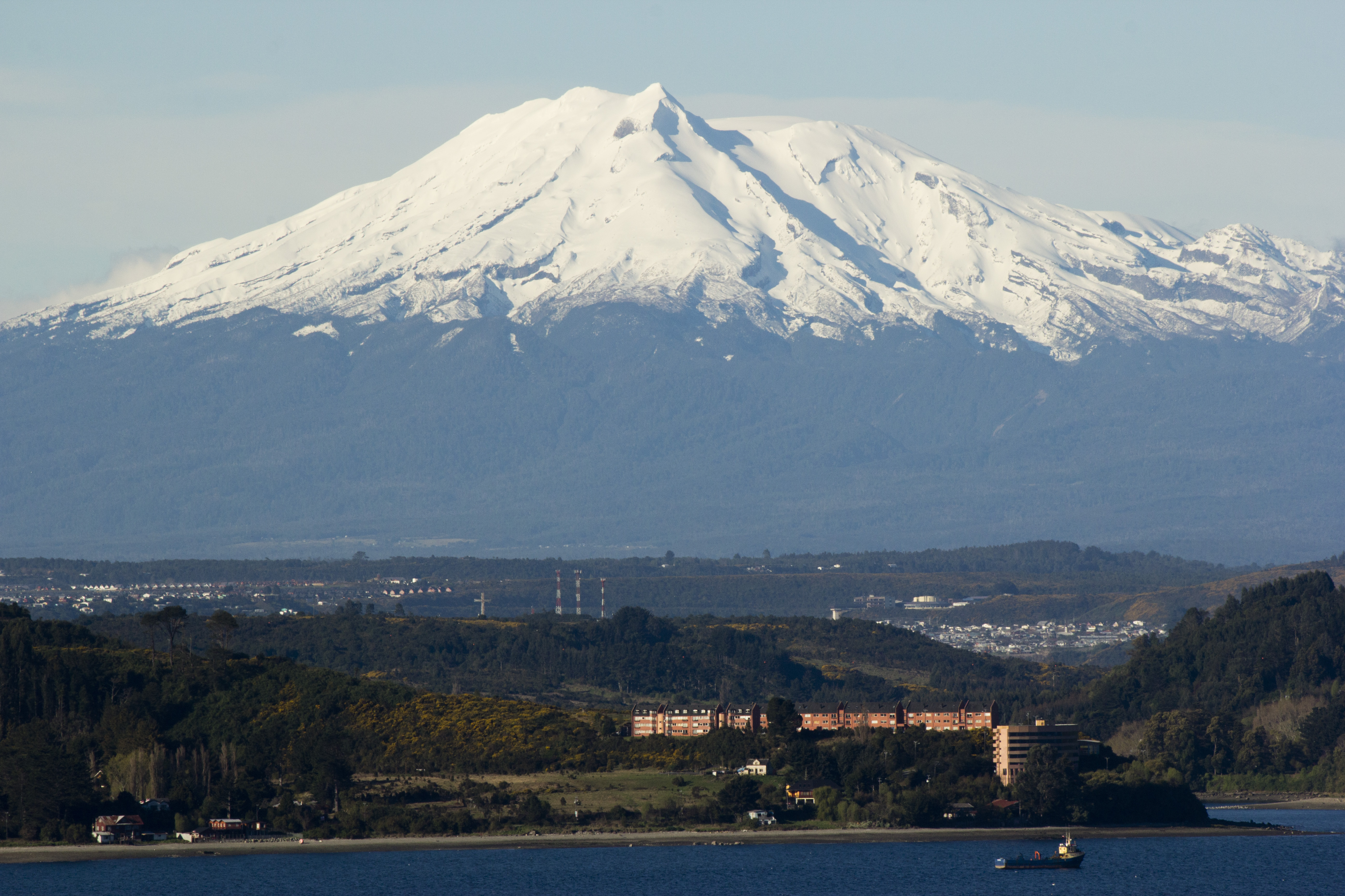 volcán Calbuco desde Panitao